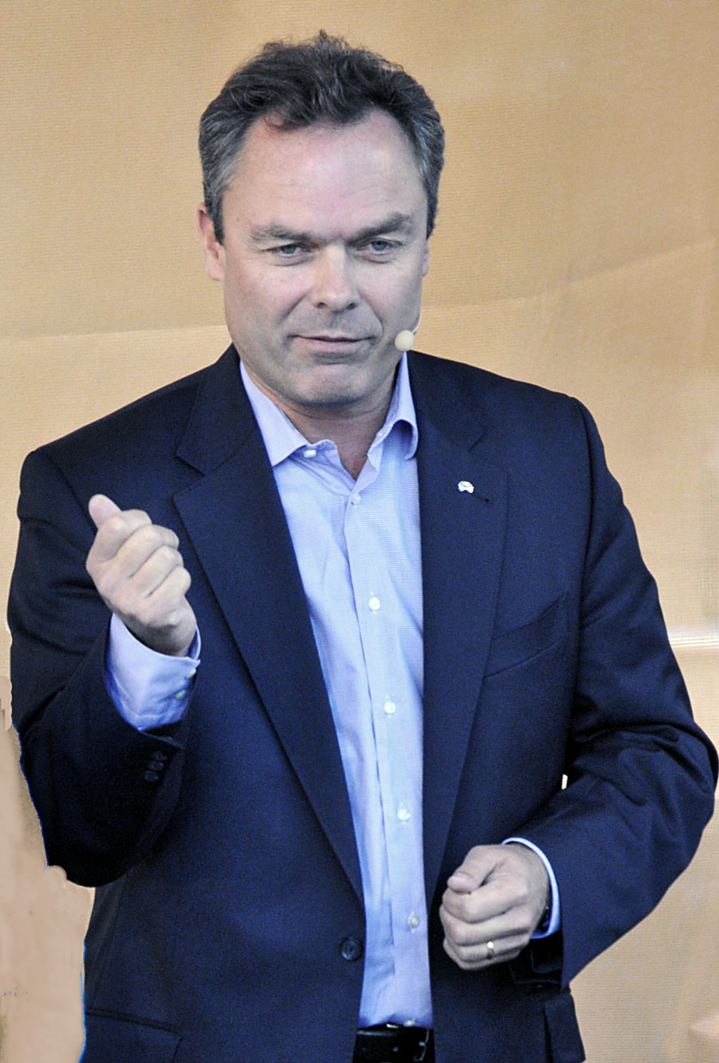 Jan Björklund auf einer Veranstaltung der "Allianz für Schweden" auf Sergels torg, Stockholm, Schweden.